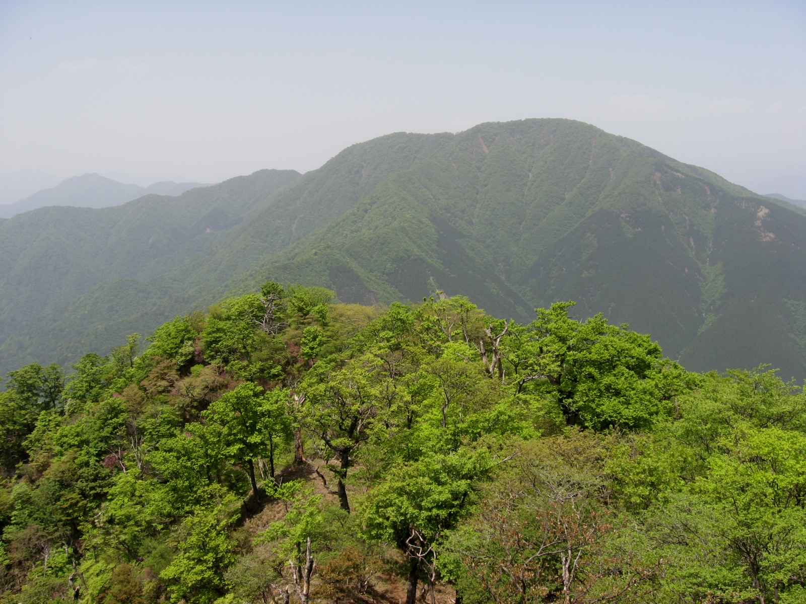 大笄からの大室山